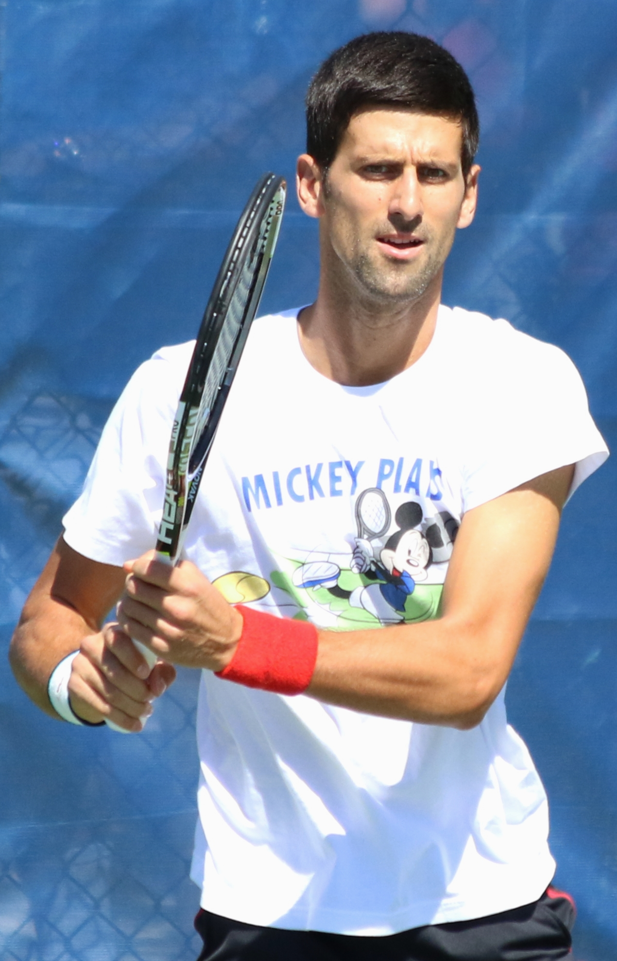 Djokovic US16 (82)